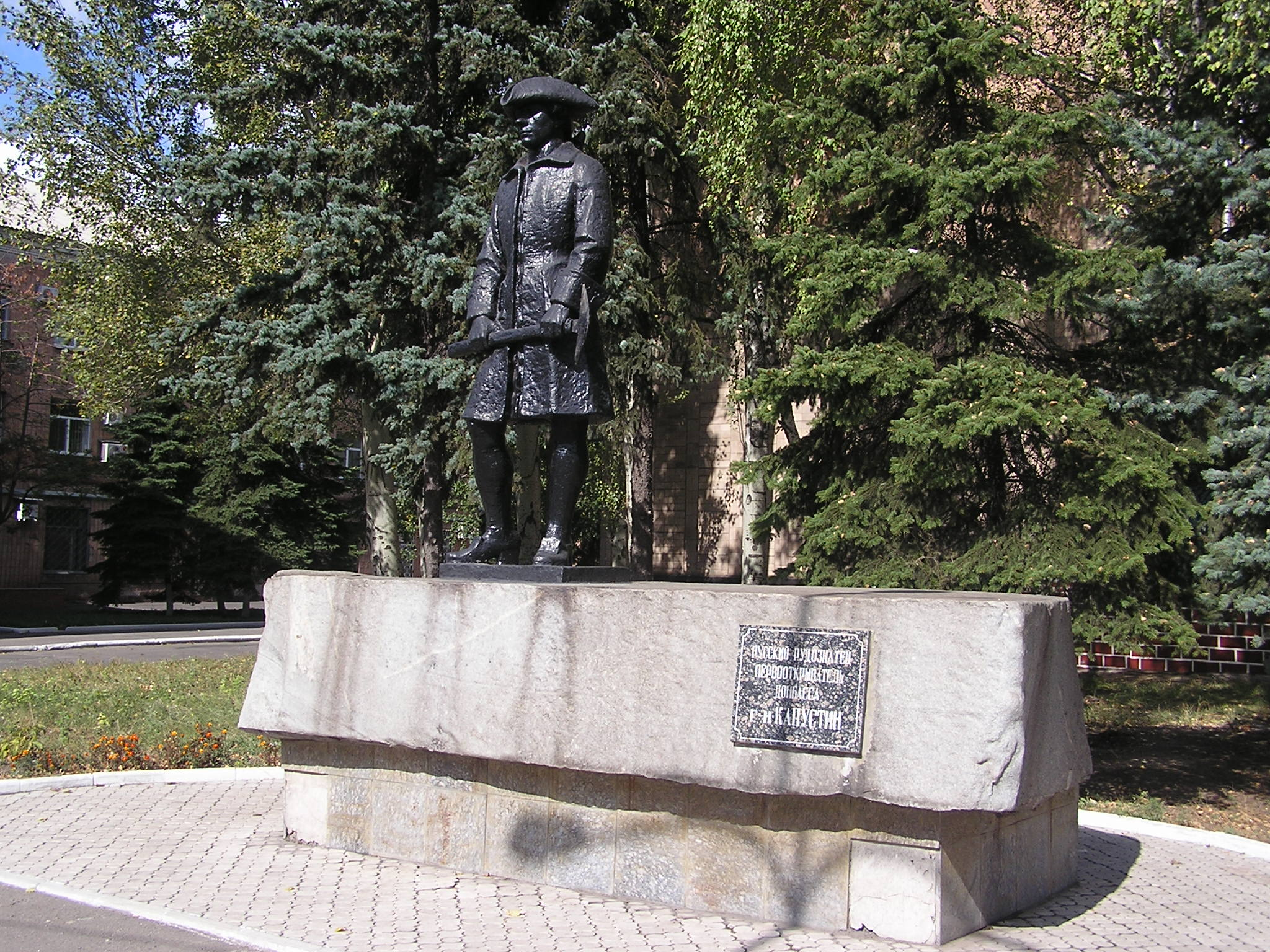 Макеевка